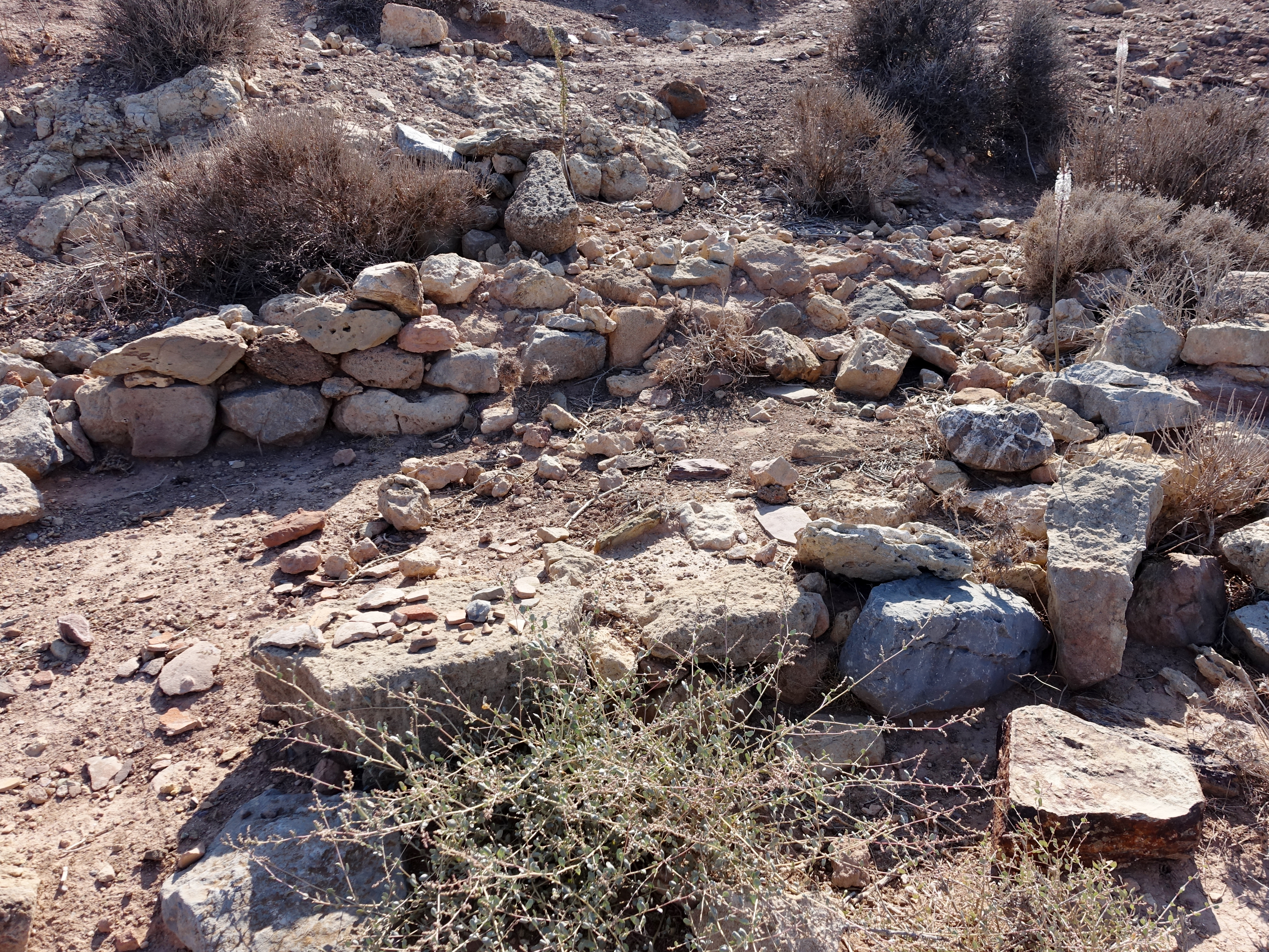 Kastri (Κασρτί) bei Palekasto, Gemeinde Sitia, Kreta, Griechenland